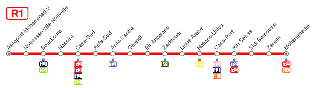 Plan de la future ligne 1 du RER de Casablanca